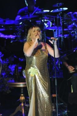 Cemiz Topuzlu Konser Salonu'ndan Sezen Aksu konserinden bir görünüm, 2012.